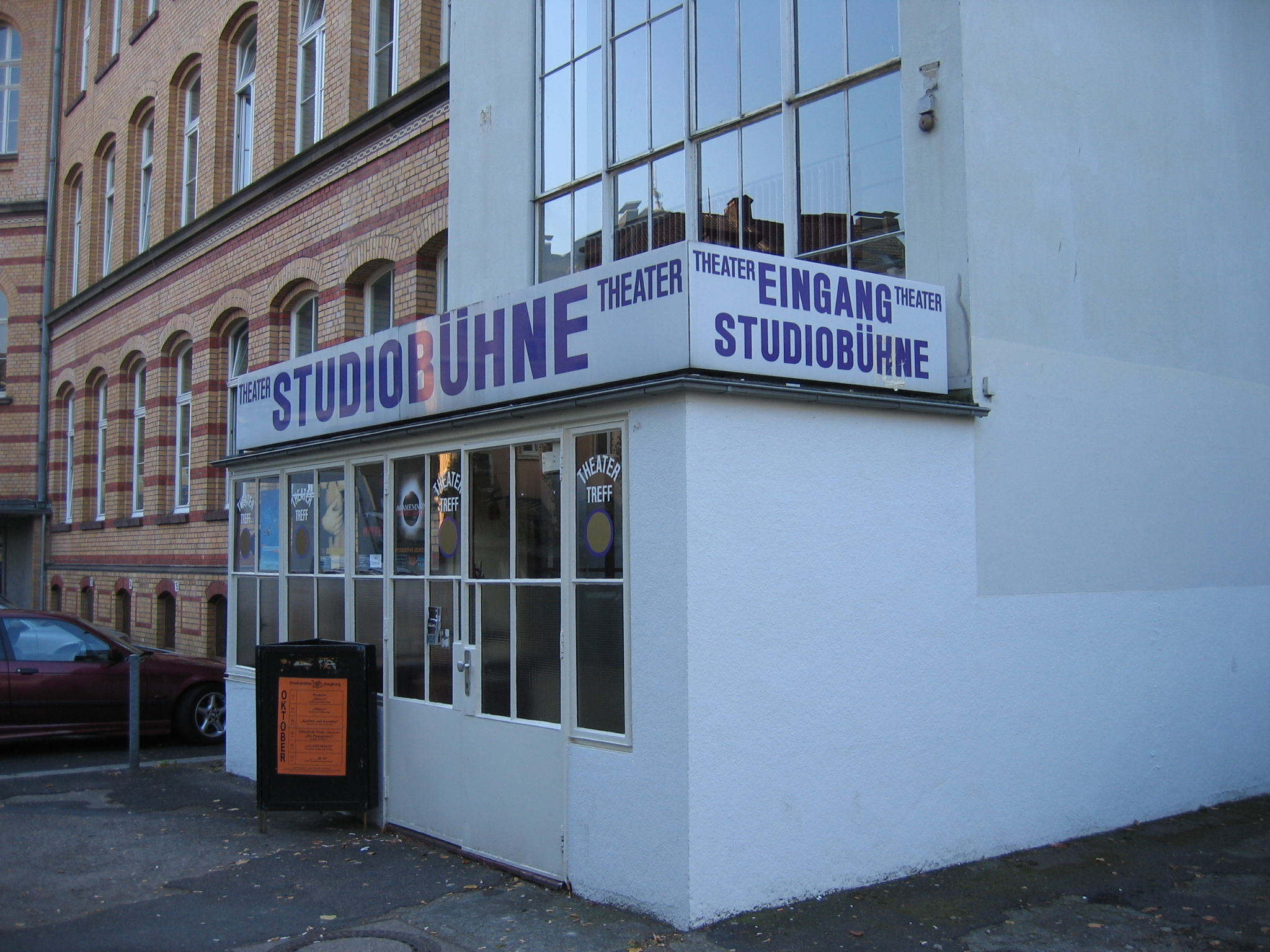 Studiobühne Siegburg